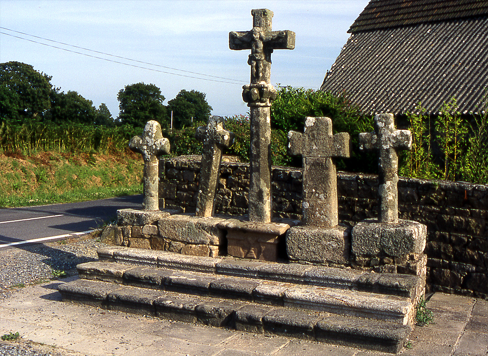 Ar Pemp Croaz (les cinq croix) à Ploubezré.